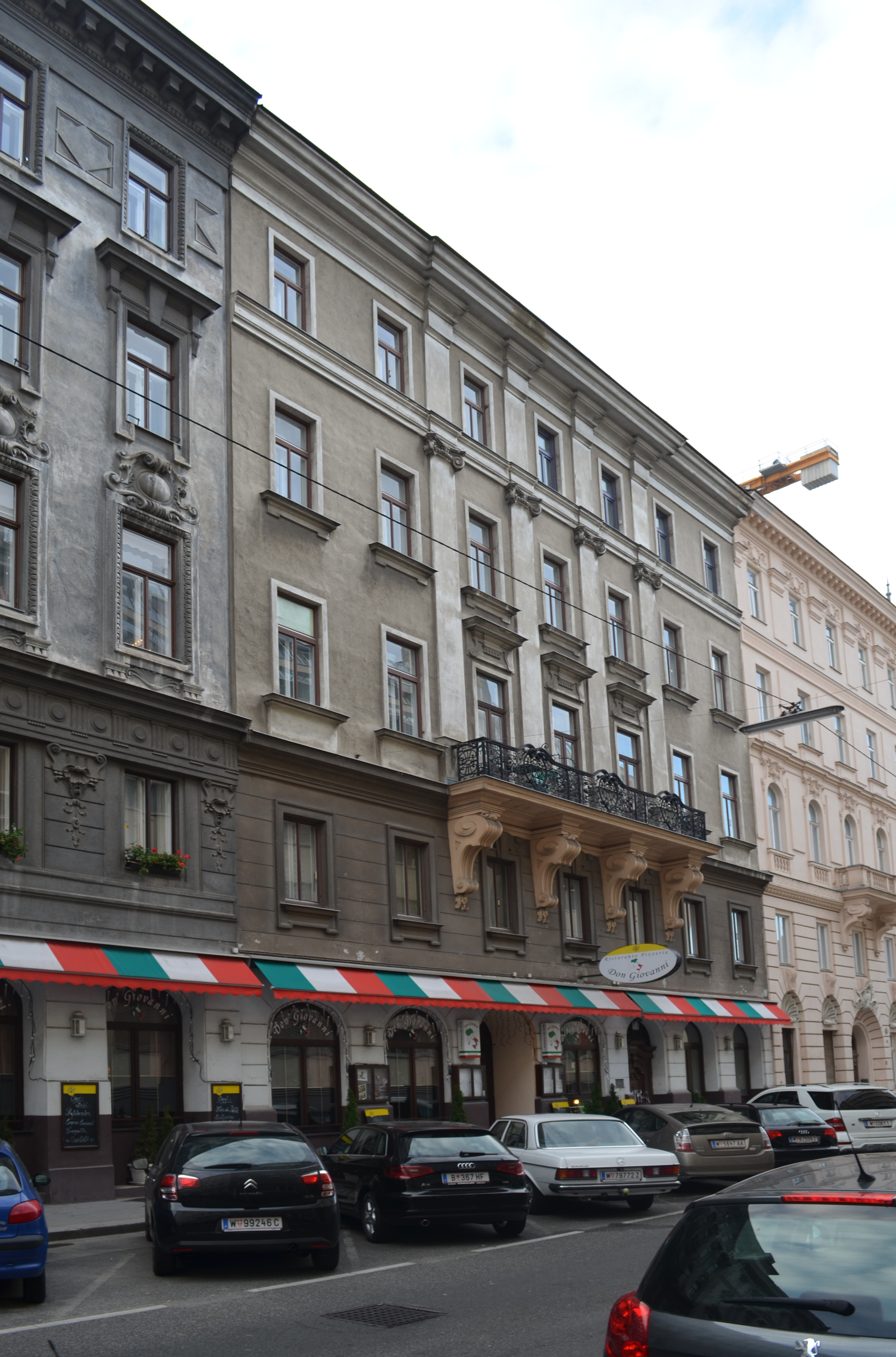 Wien, Weyringergasse 7a